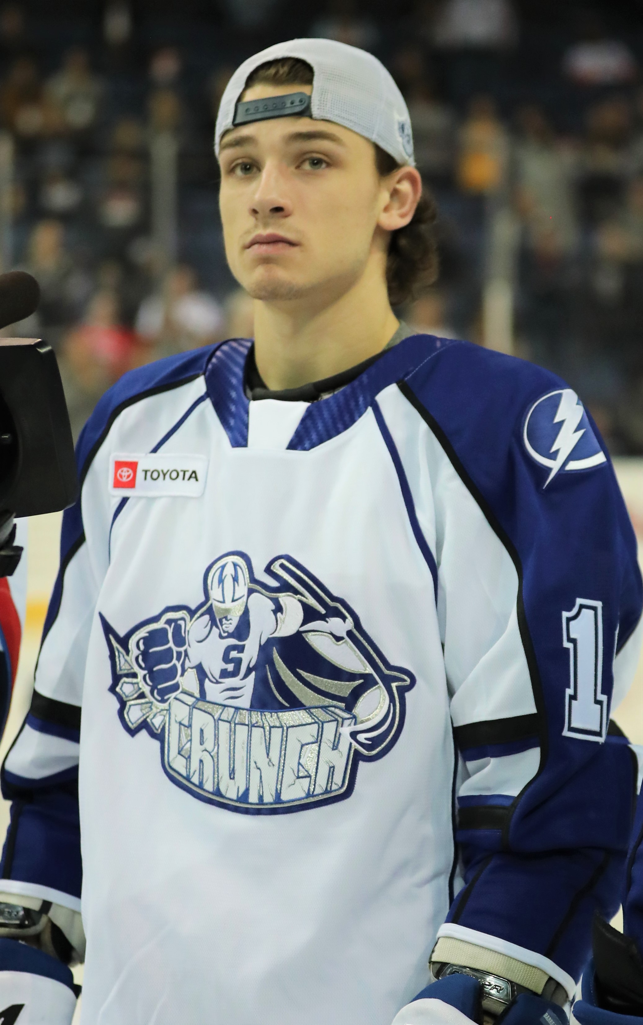 AA3I0777